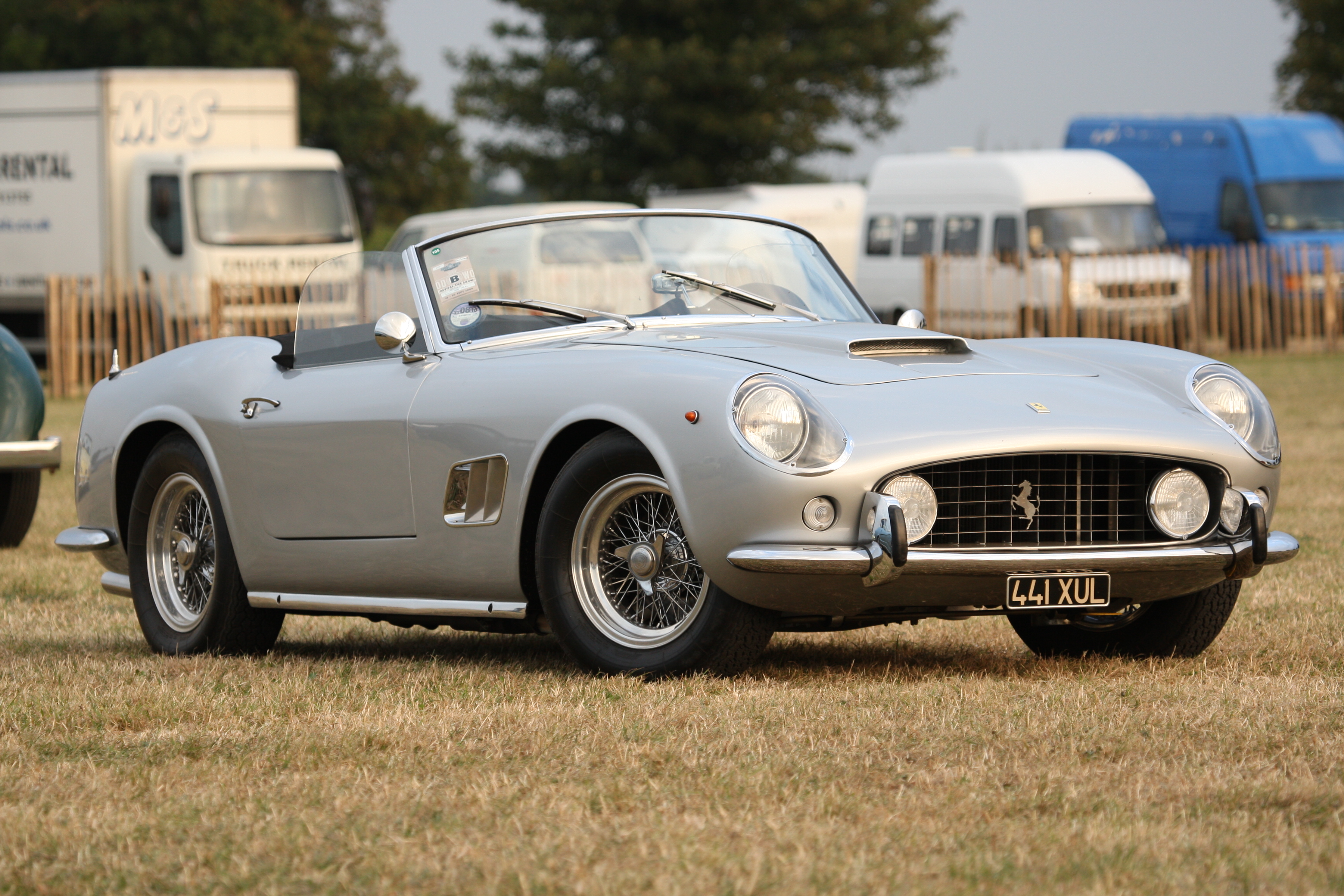 Ferrari 250 GT California Spyder SWB au Goodwood Revival 2009